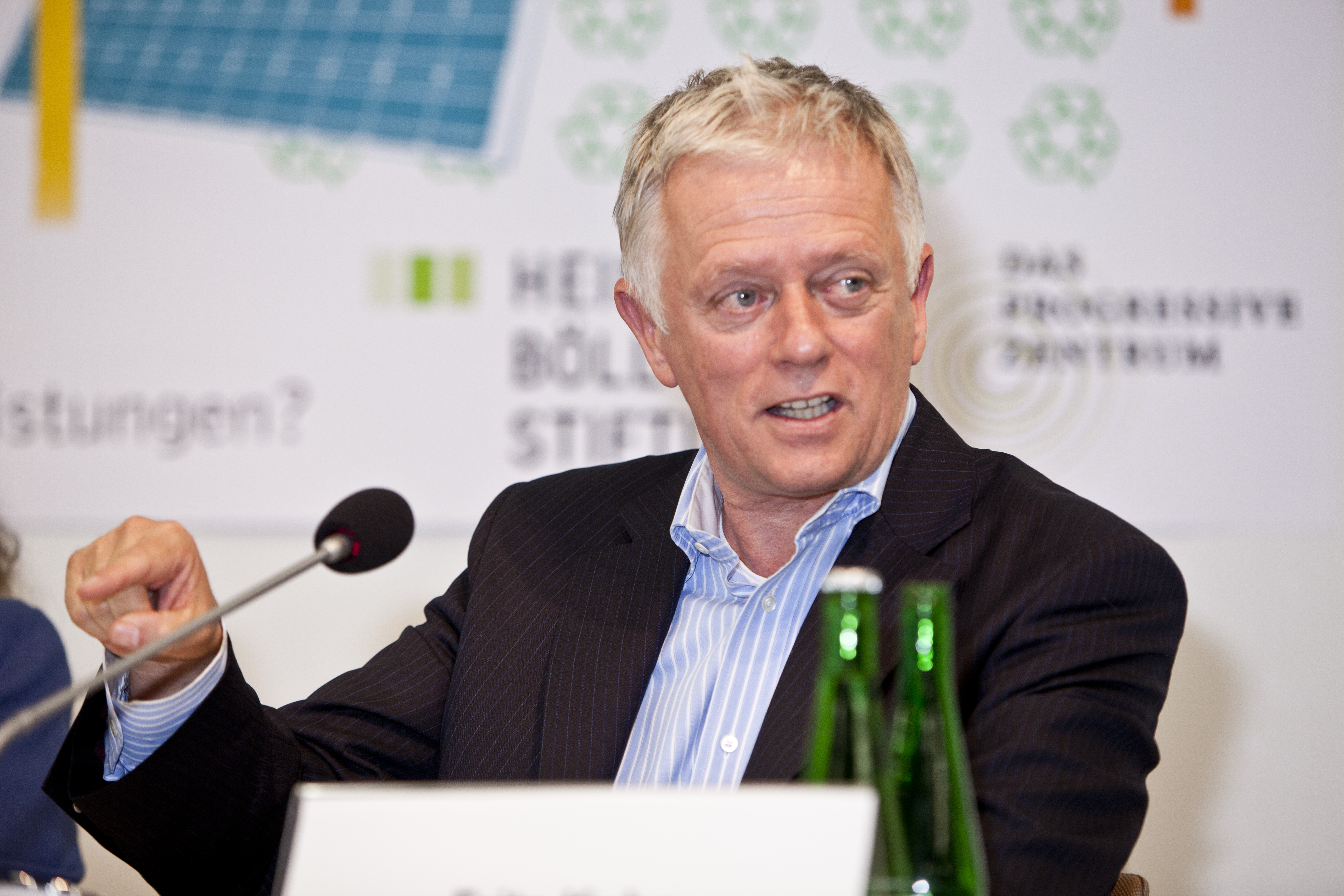 Foto: Neumann und Rodtmann